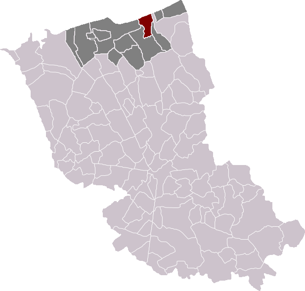 Locatie gemeente Leffrinkhoeke in arrondissement Duinkerke. Zelfgemaakt. Location of Leffrinckoucke municipality in the arrondissement of Dunkirk. Self made. Localisation de la commune de Leffrinckoucke dans l'arrondissement de Dunkerque. Fait moi-même.